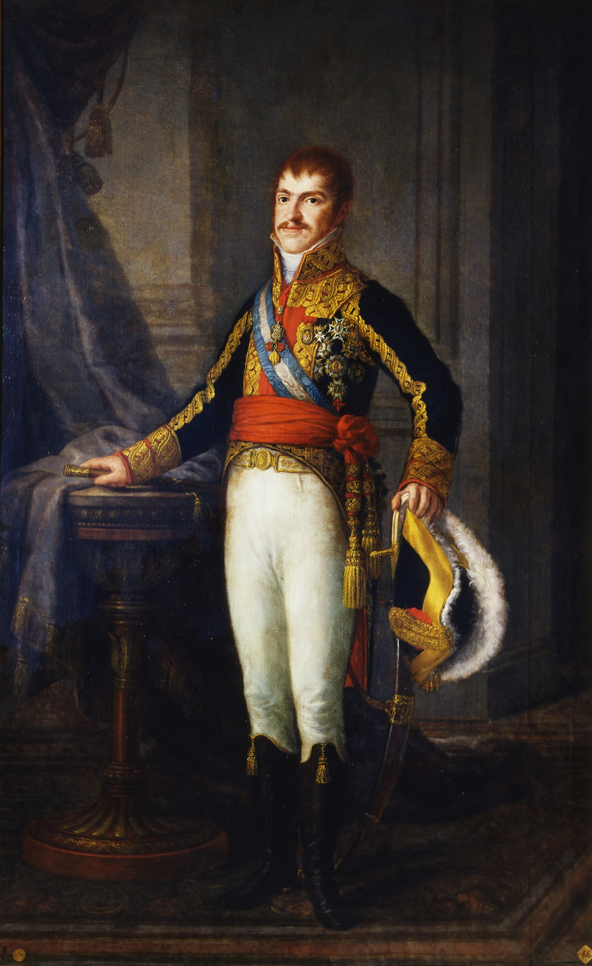 Retrato del infante Carlos María Isidro de Borbón (1788-1855), con uniforme de capitán general y portando varias condecoraciones. Era hijo del rey Carlos IV de España y hermano de Fernando VII.